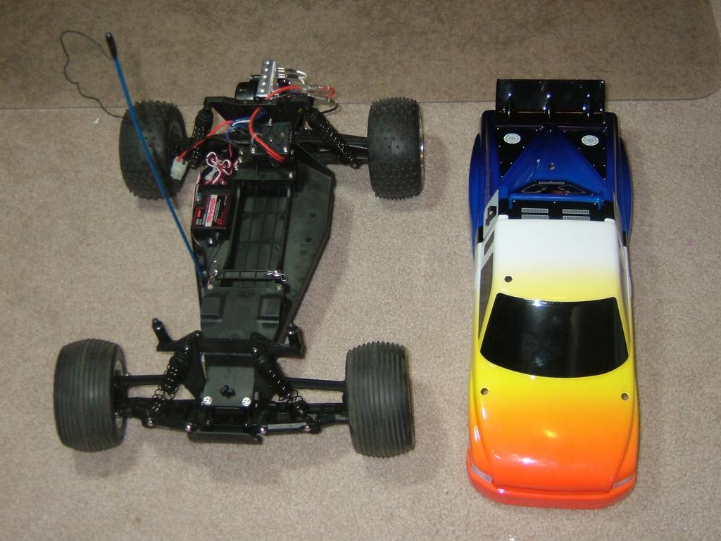 An electric RC car